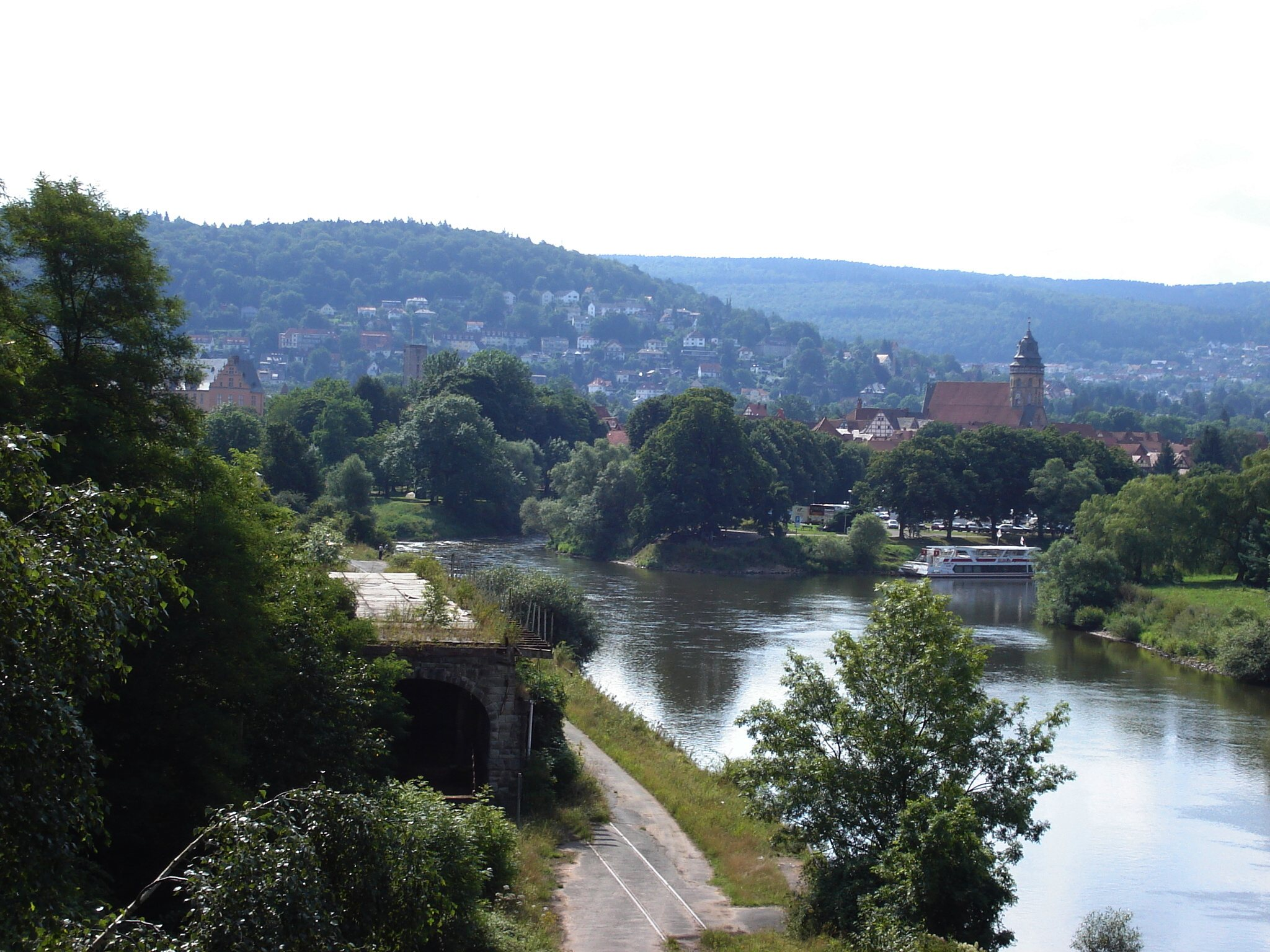 Hann. Münden, Zusammenfluss von Werra und Fulda zur Weser